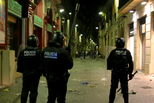 Càrrega dels Mossos d'Esquadra294125173